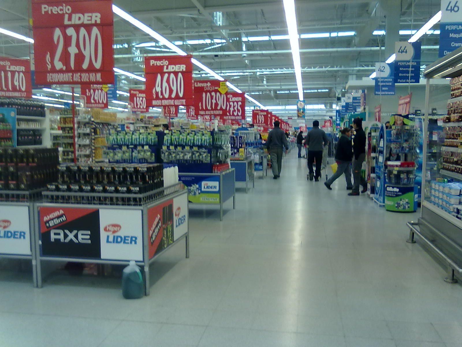 Interior de Supermercado Hiper Lider de Quilicura